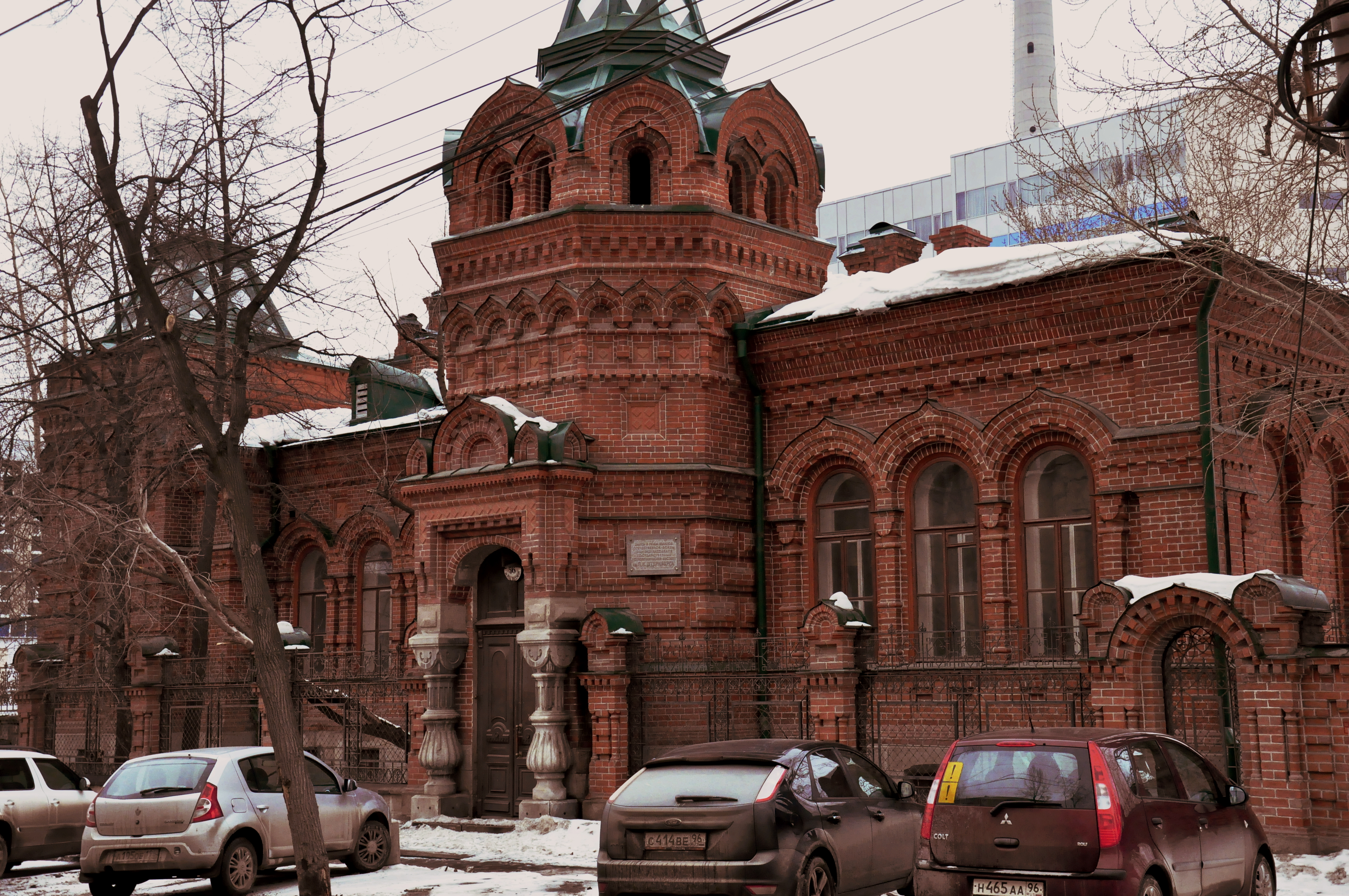 года постройки 1892—1895